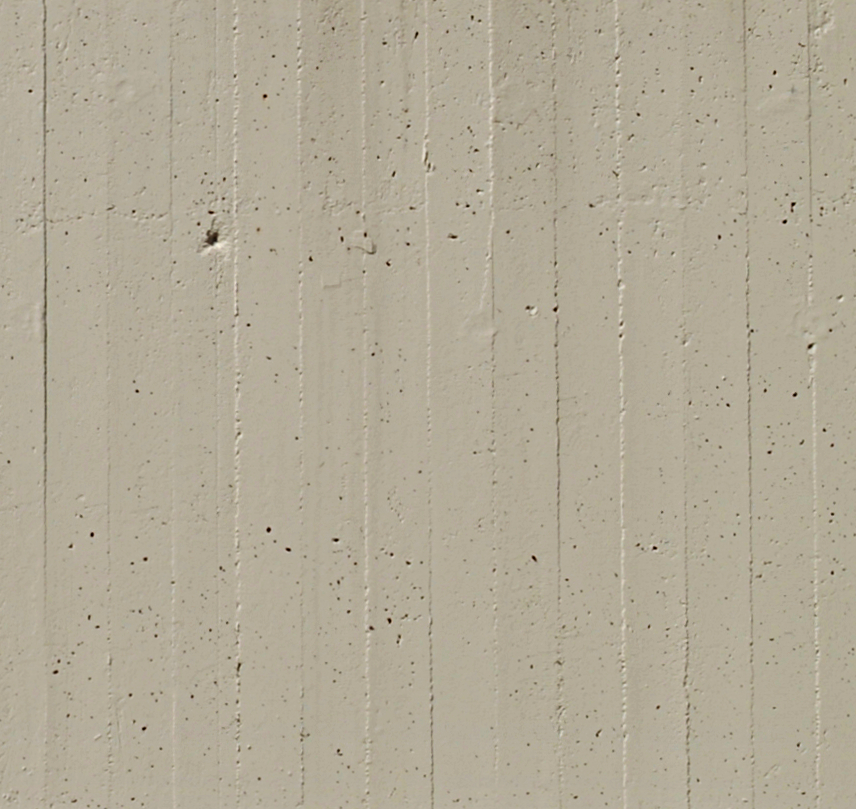 Belgique - Louvain-la-Neuve - Centre sportif de Blocry - Façade (détail du béton brut)